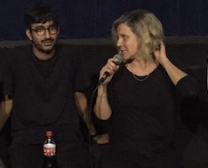 Phaim Bhuiyan e Vanessa Picciarelli durante la presentazione del film Bangla al festival della rivista Internazionale a Ferrara.